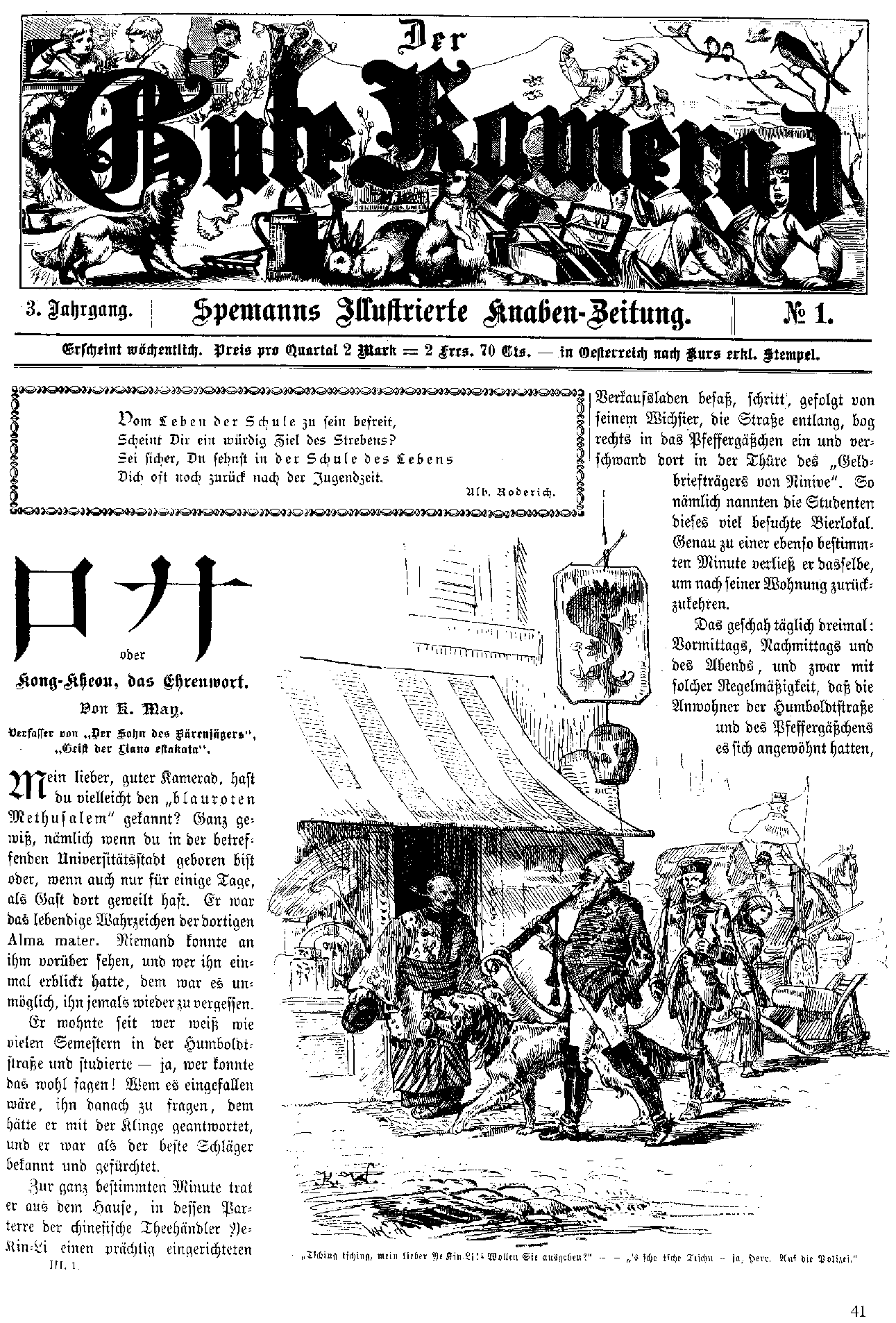 Erste Seite des Fortsetzungsromans Kong-Kheou, das Ehrenwort (später Der blaurote Methusalem) von Karl May, erschienen in der Zeitschrift Der Gute Kamerad im Verlag Wilhelm Spemann